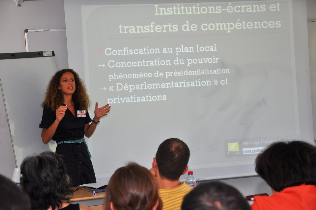 Journées "Remues-ménages" du Parti de gauche, à Grenoble (France) à la fin août 2011.